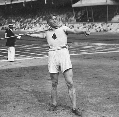 Julius Saaristo Tukholman olympialaisissa 1912